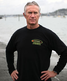 ian ferguson